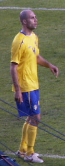 Teddy Lucic